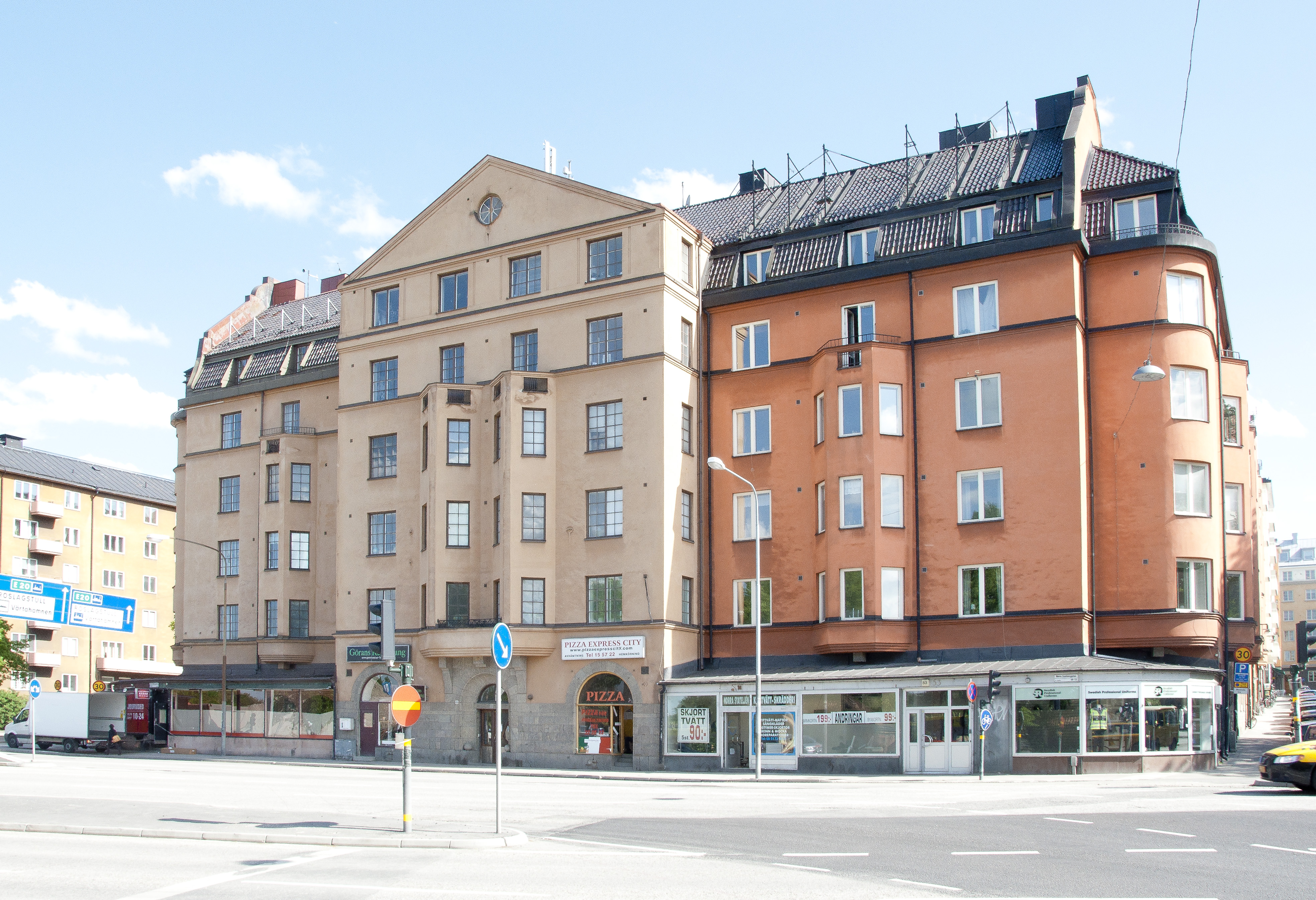 Norra Stationsgatan 49-53. Byggnadsår 1915-16, arkitekt Axel Wetterberg